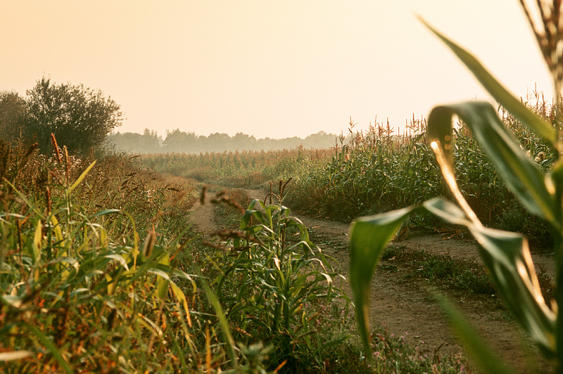 Подмосковный пейзаж. Кукурузное поле